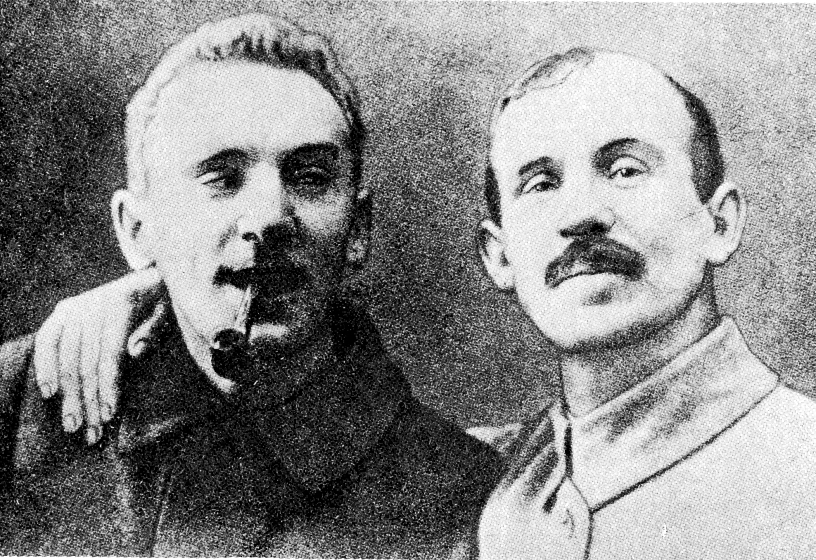 Беларуская (тарашкевіца): Беларускія драматургі і тэатрыльныя дзеячы Францішак Аляхновіч і Ўладзіслаў Галубок